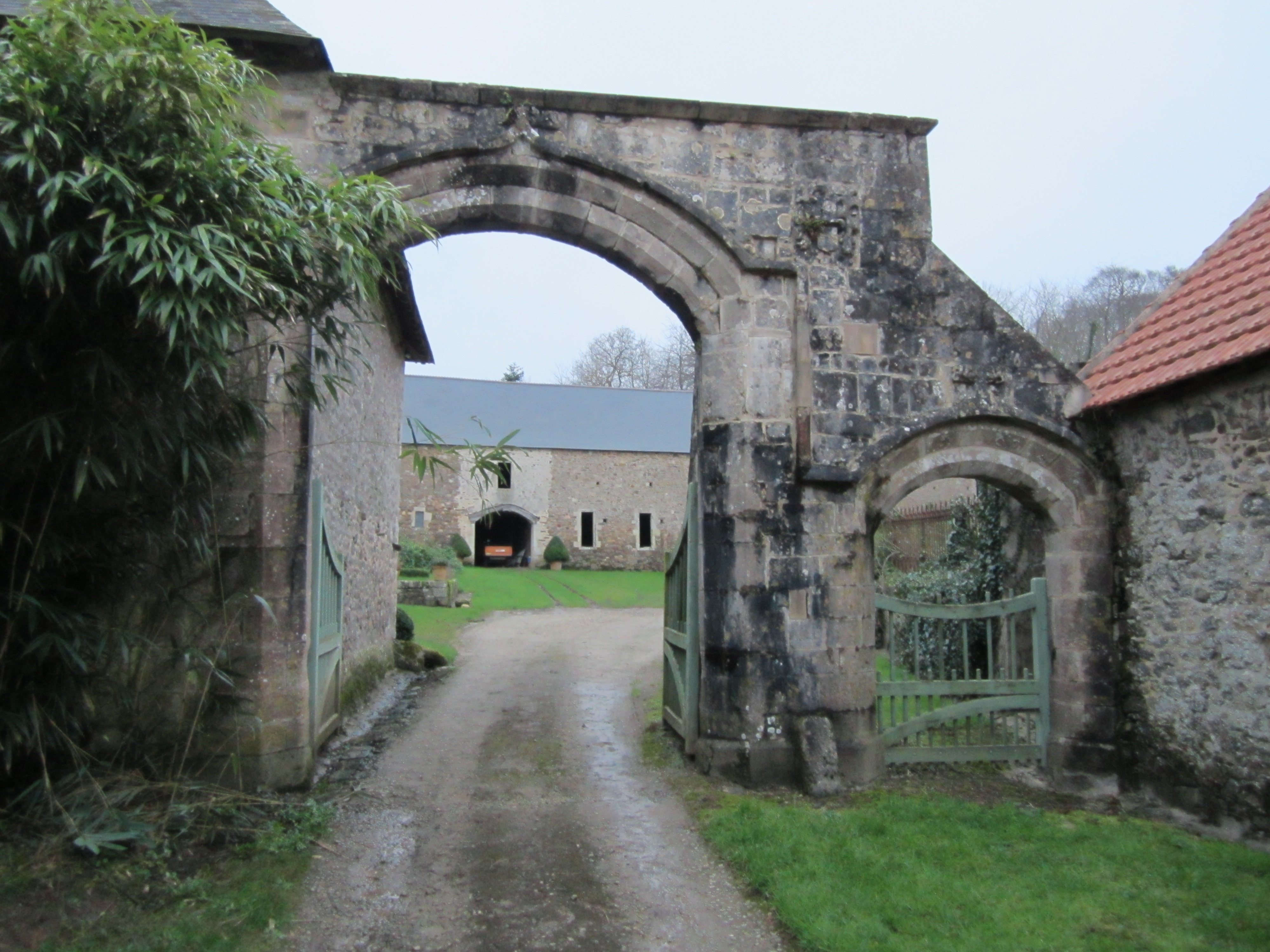 Pavillon de Grenneville édifice a été construit à la fin du 15e siècle ou au début du 16e siècle